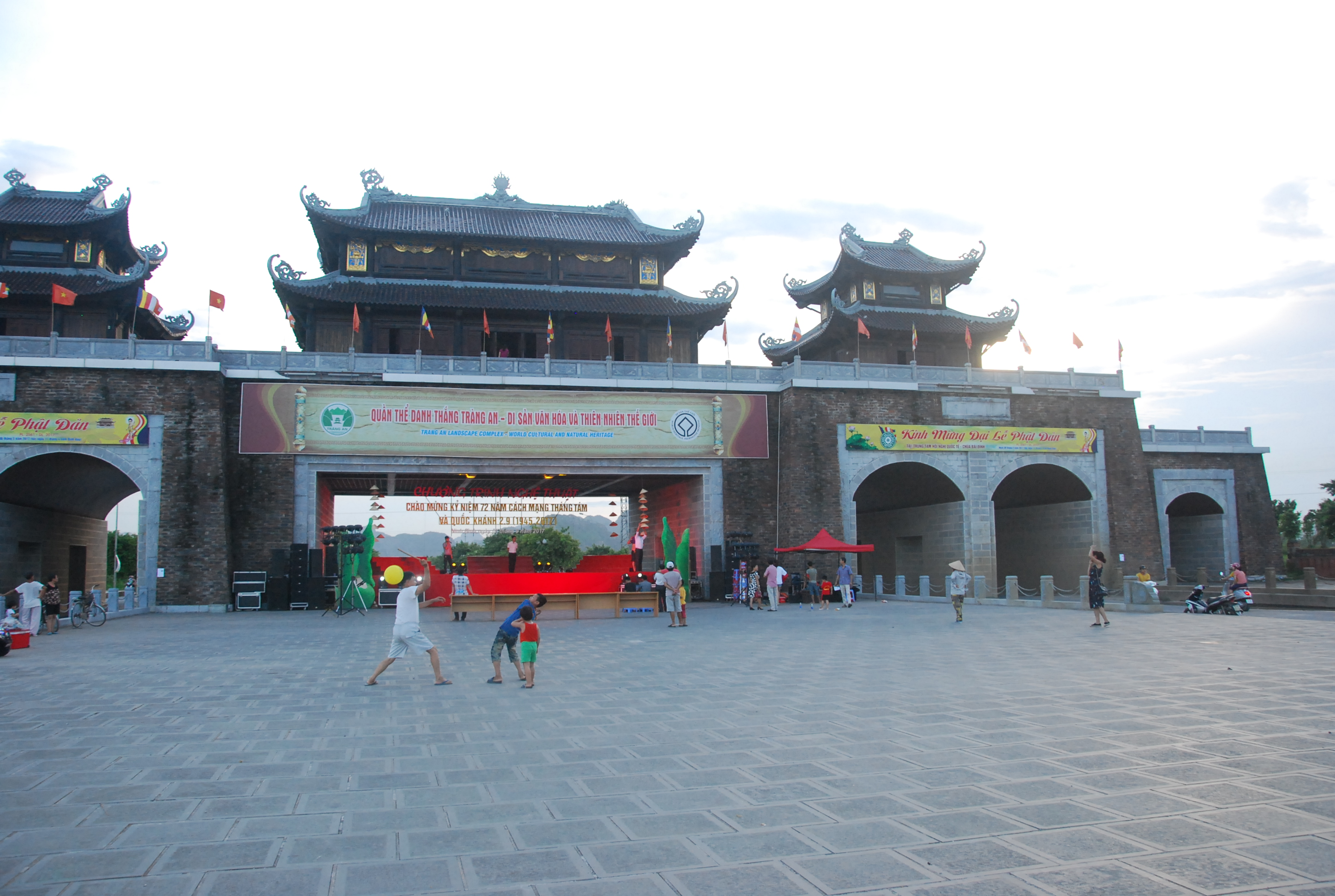 Phong cảnh khu vực Cổng Tràng An ở thành phố Ninh Bình